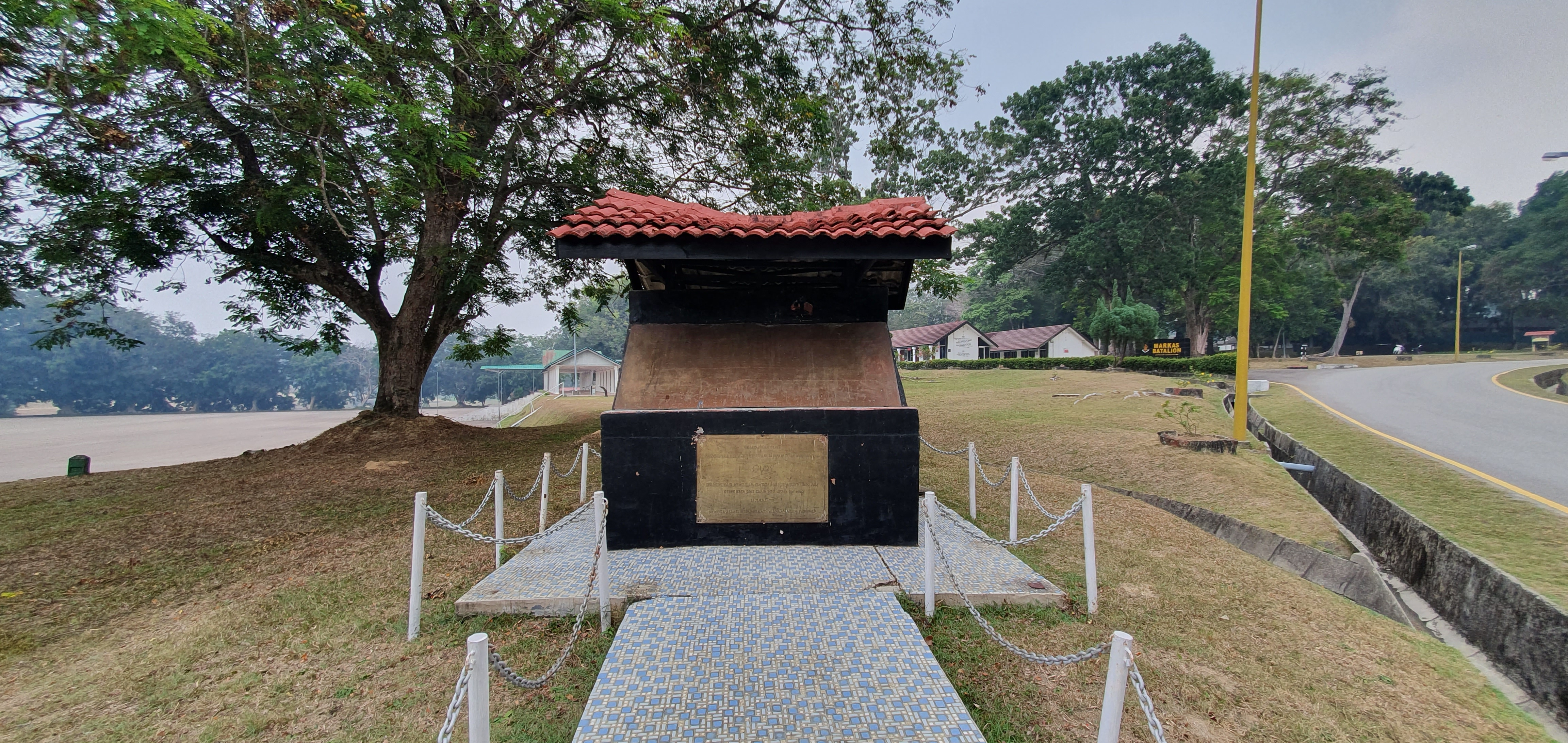 Nama2 pengasas 8 RRD